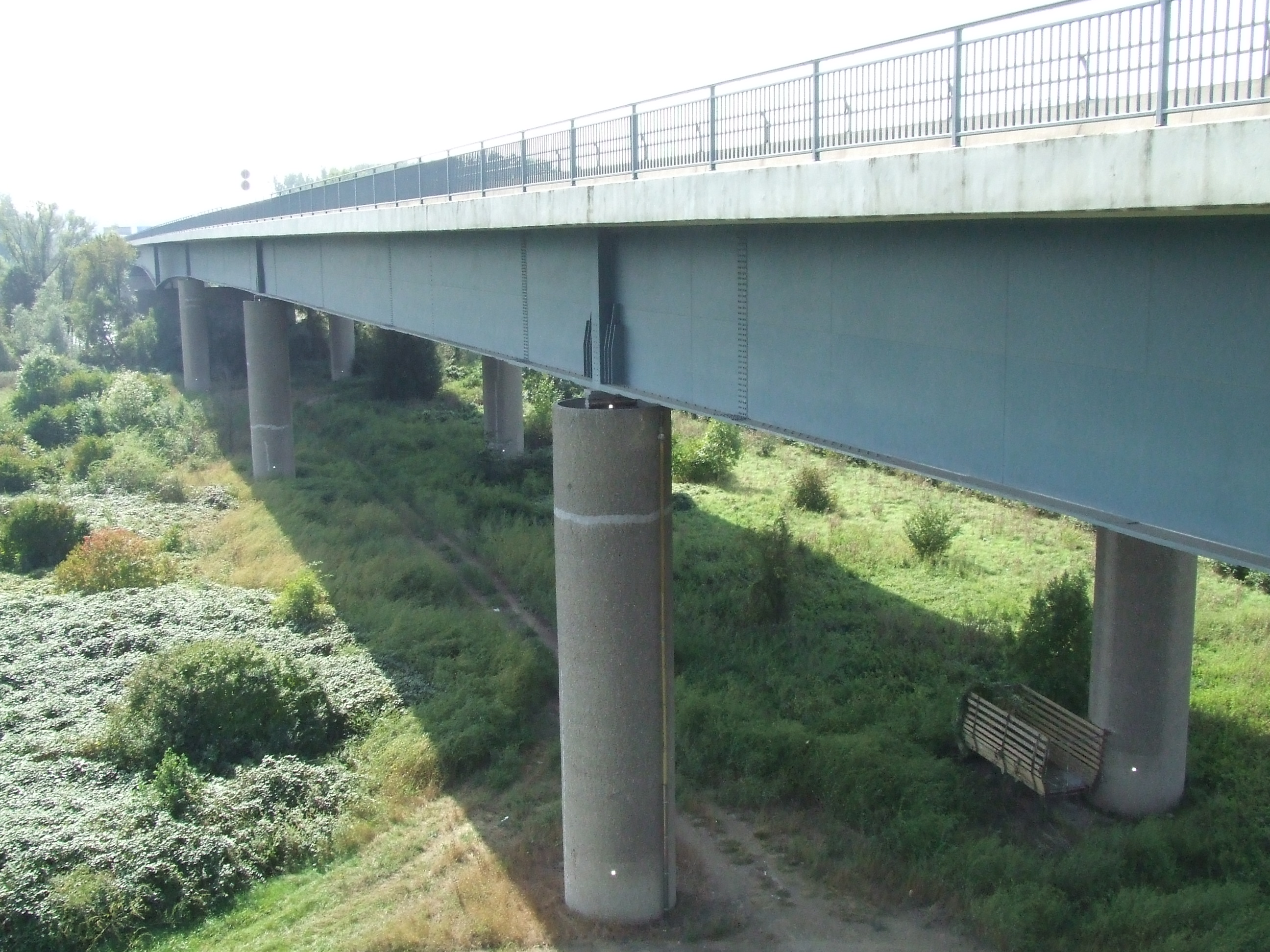 Bridges between Mainz and Wiesbaden - Schiersteiner Brücke zwischen Mainz und Wiesbaden